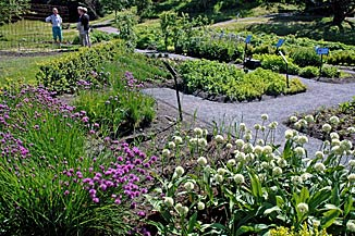 Litt av Nytteveksthagen i Botanisk hage, med diverse Allium i forgrunnen.